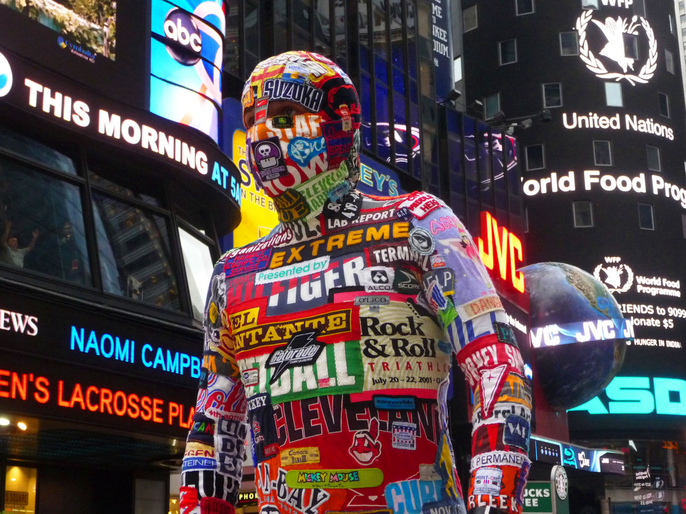 Jiří Černický: Nikdo Čitelný, 2005, kombinéza, film, performance – Čchan-Čchun(Čína), New York, Cleveland(USA).